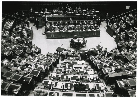 Presentazione alla Camera del terzo Governo Rumor